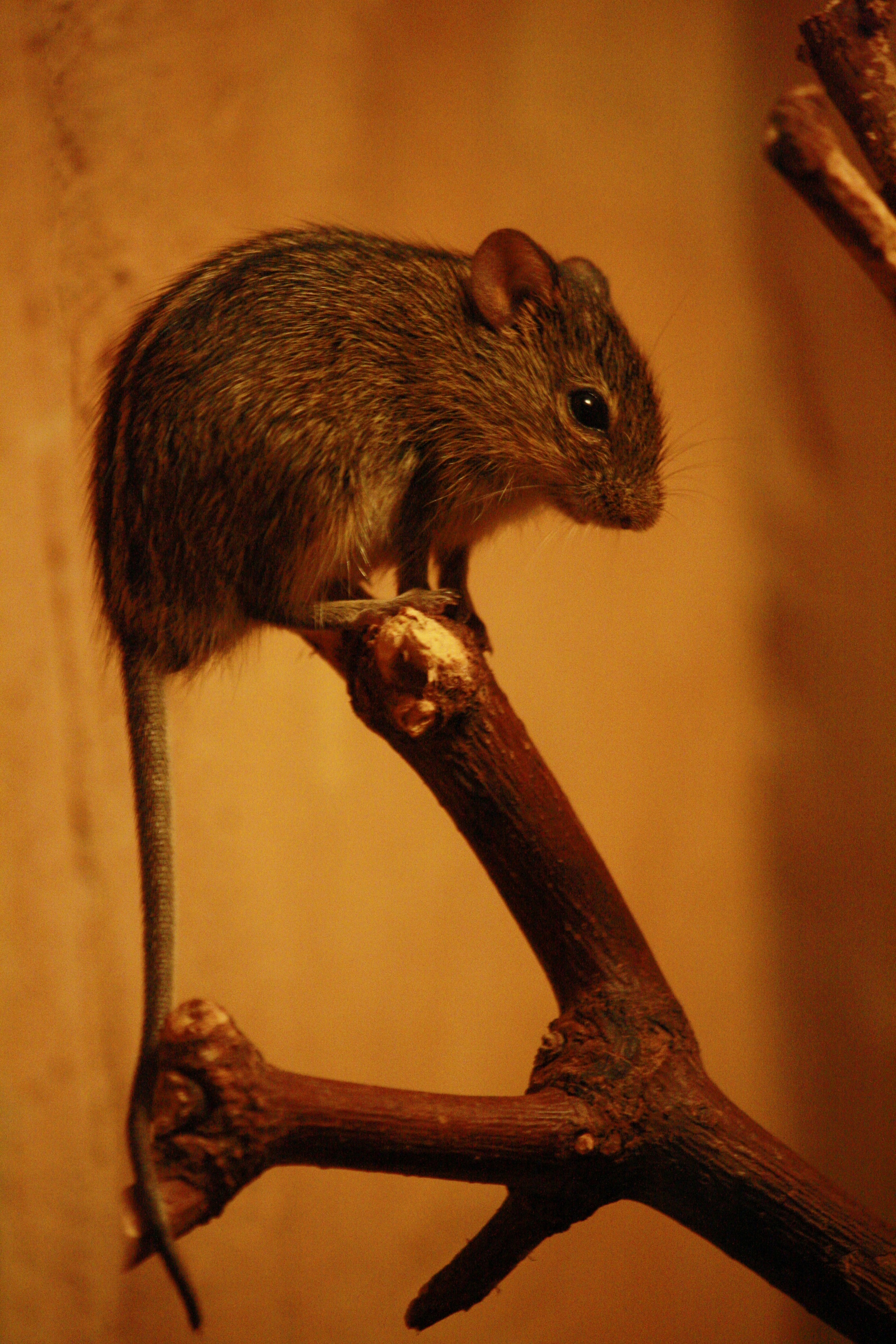 Zoo Praha